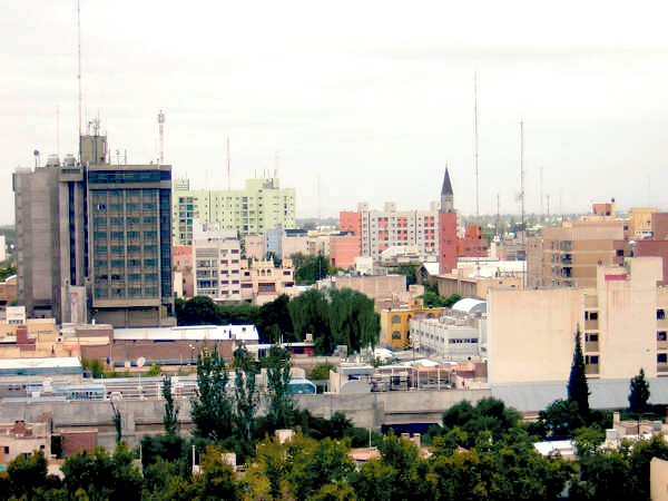 Vista de la ciudad de San Juan desde el edificio Tambolar